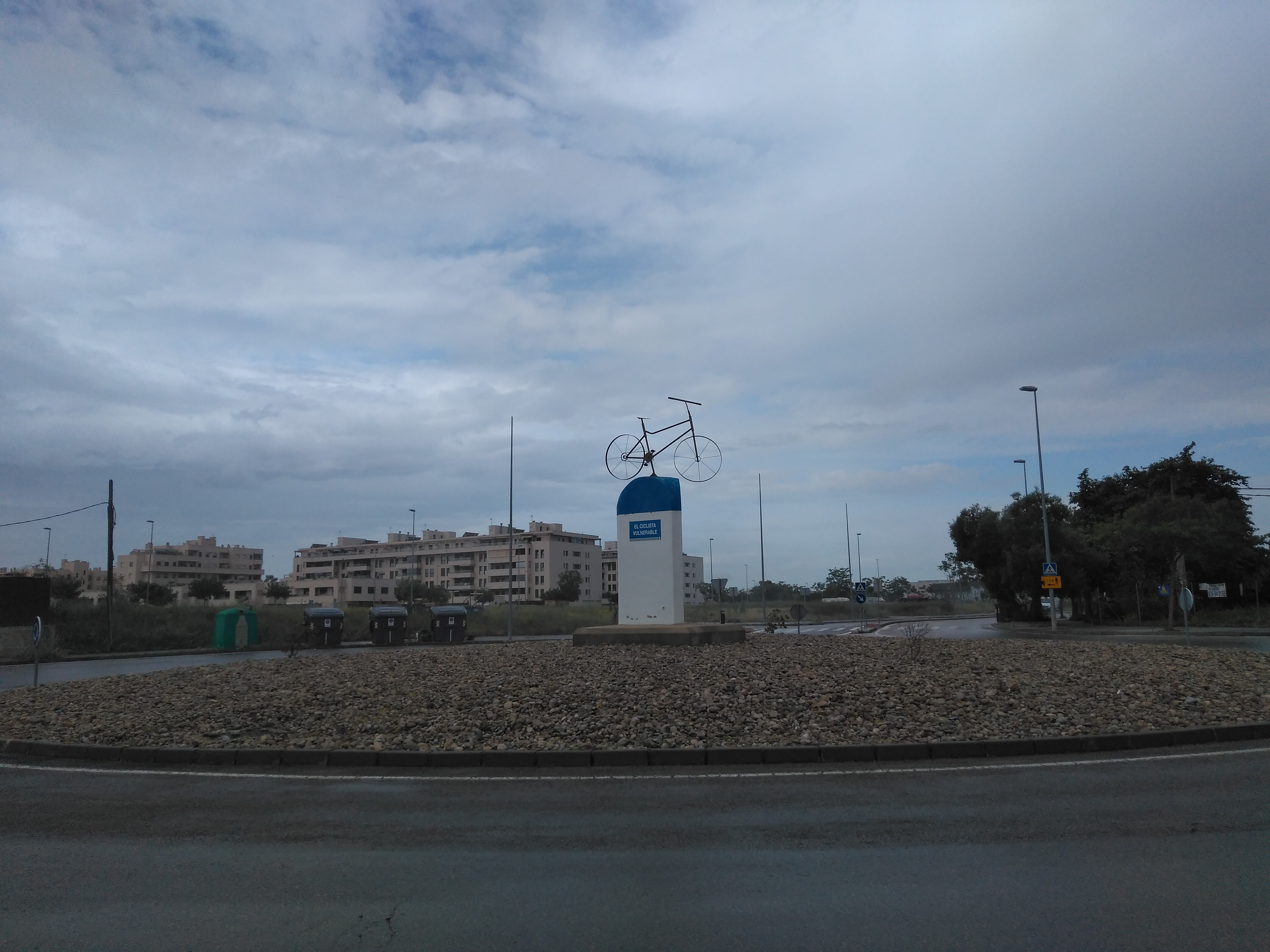 Monumento a "El Ciclista Vulnerable" en Jerez de la Frontera (España)